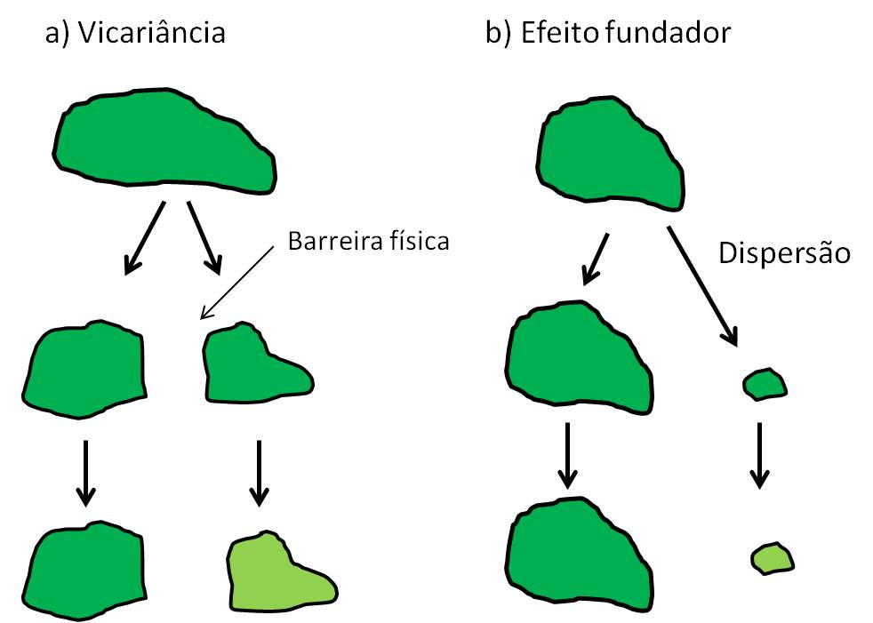 Esquema sobre viacariância e dispersão